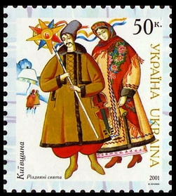 Марка з серії "Народний одяг України" 2001 Київщина Різдвяні свята